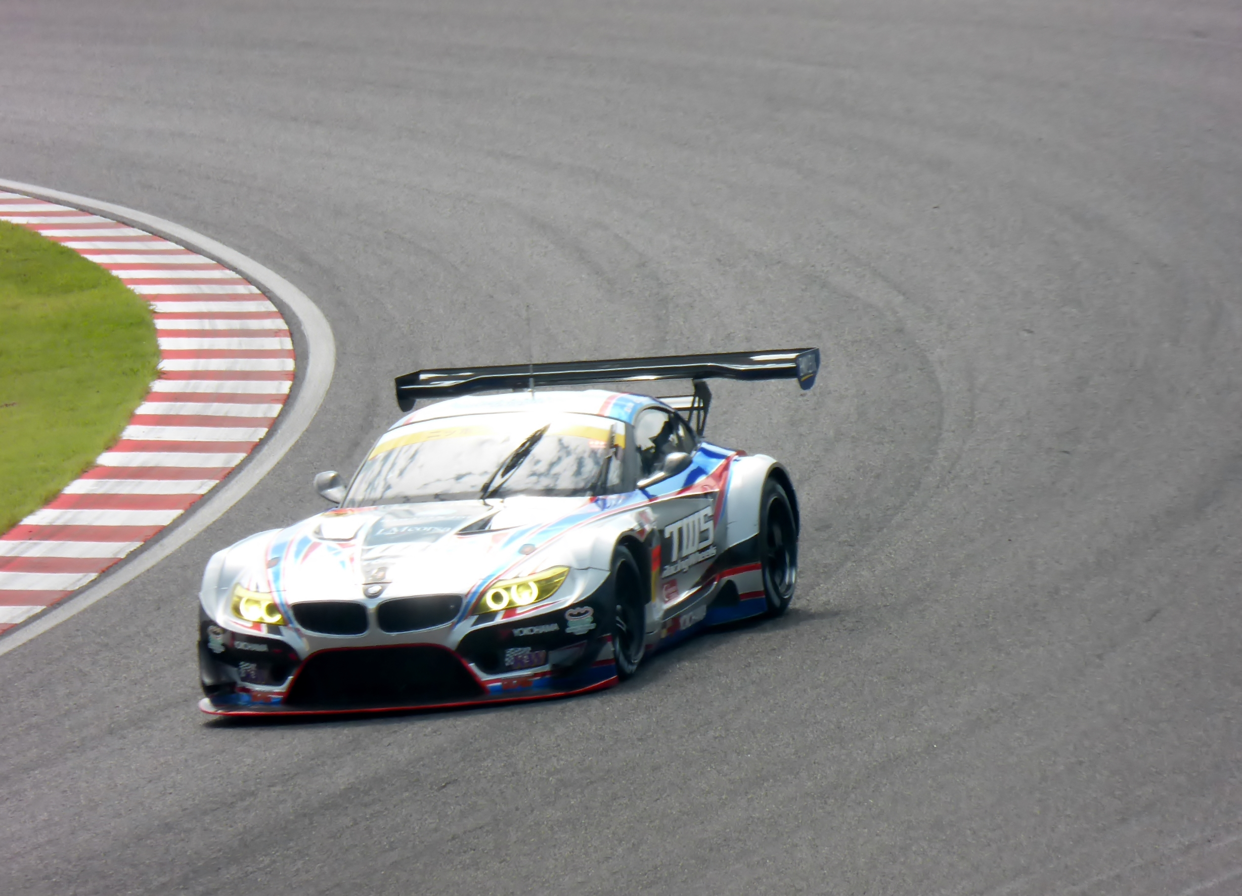 2014年度ポッカサッポロ1000kmにおける60号車TWS LM Corsa BMW Z4を撮影。